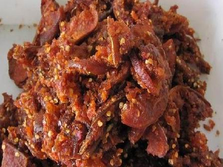 这个图片是我家乡的特产——南瓜干